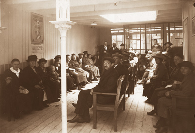 Geneeskundige armenzorg zittingslokaal GG&GD Amsterdam eind jaren '20